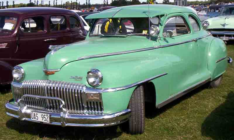 De Soto Deluxe Club Coupe 1947